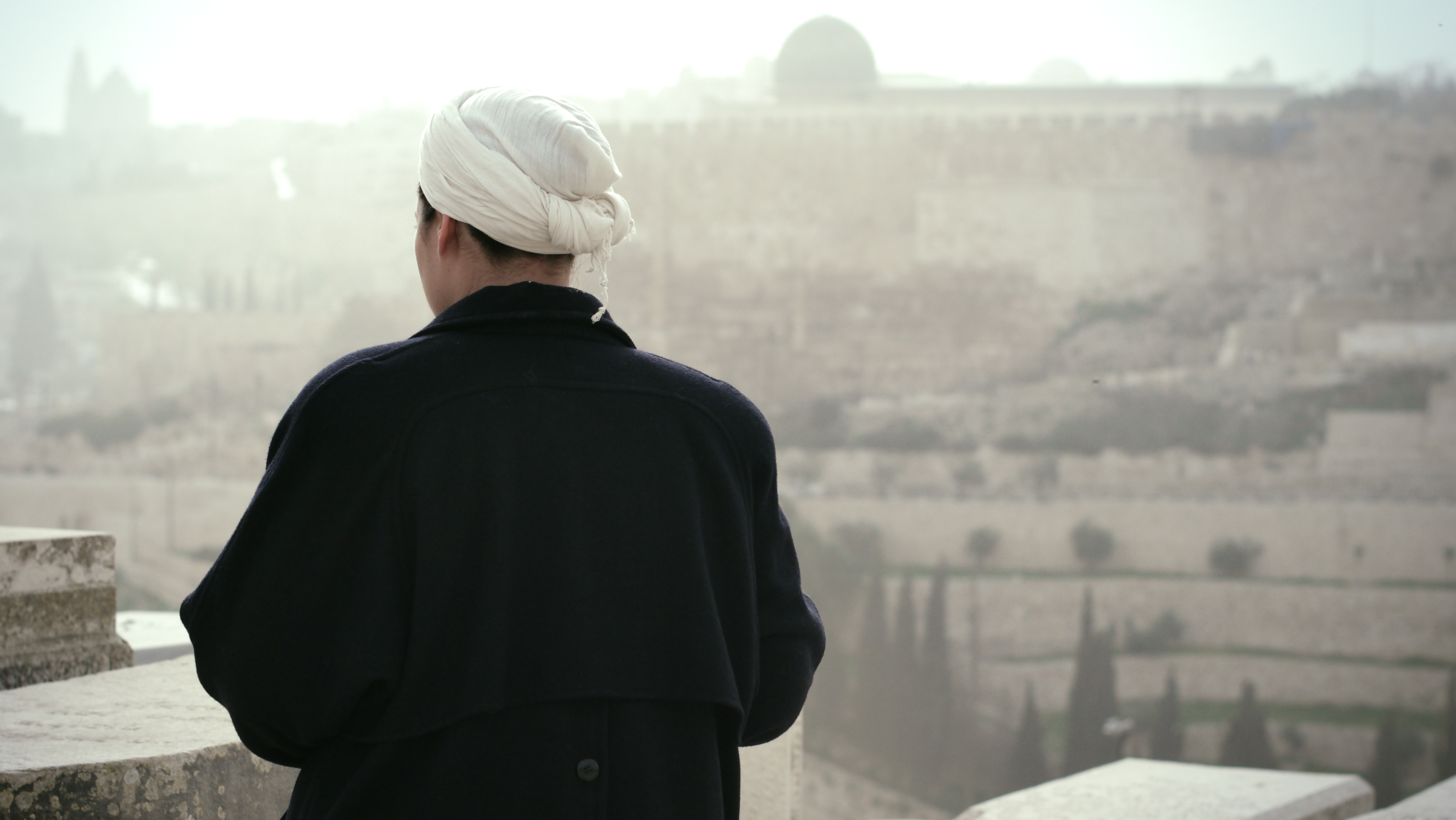 שני קליין בסרט ההר